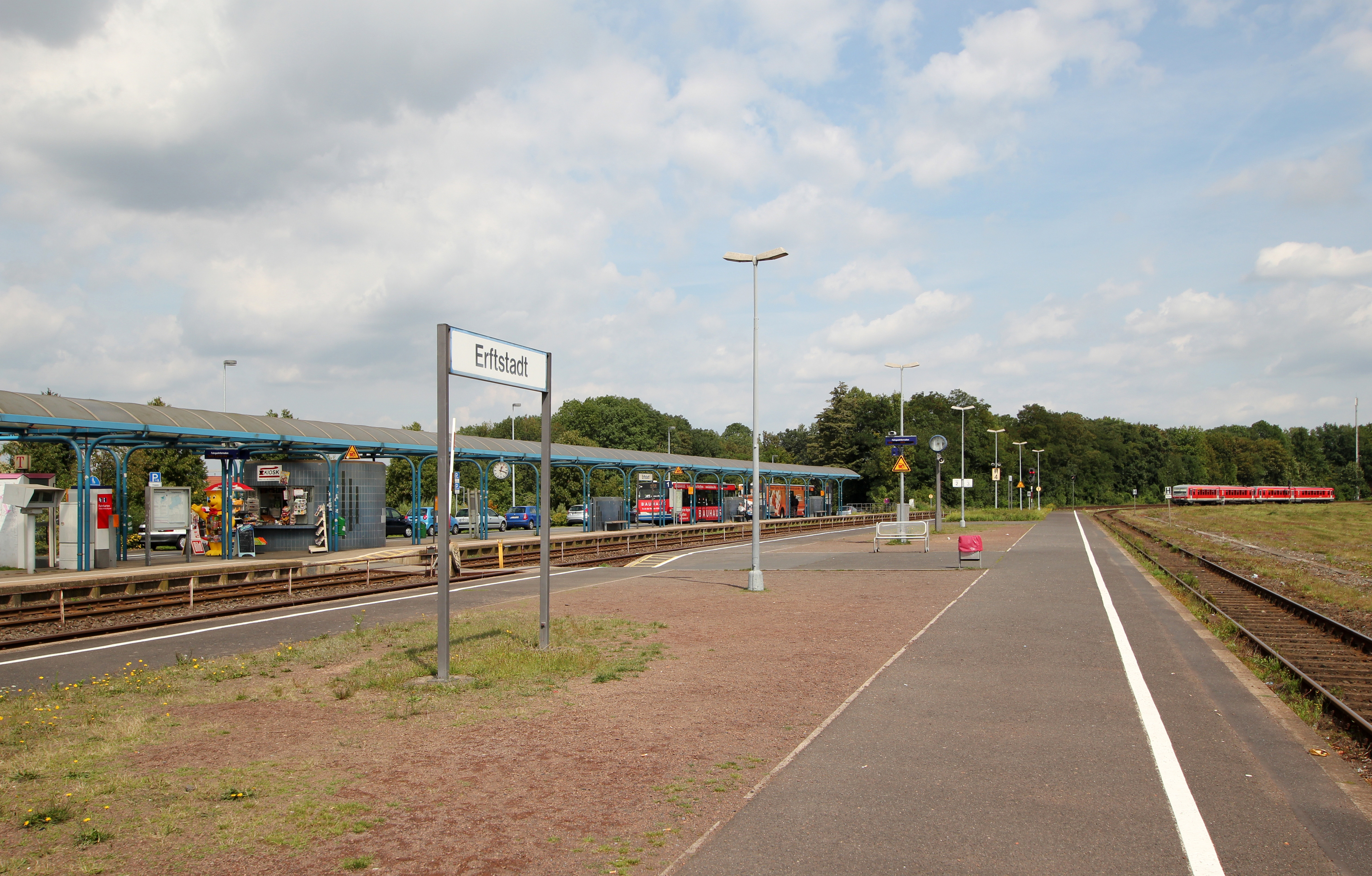 Erftstadt-Liblar (alter Zustand der Bahnsteige vor dem Umbau 2015)